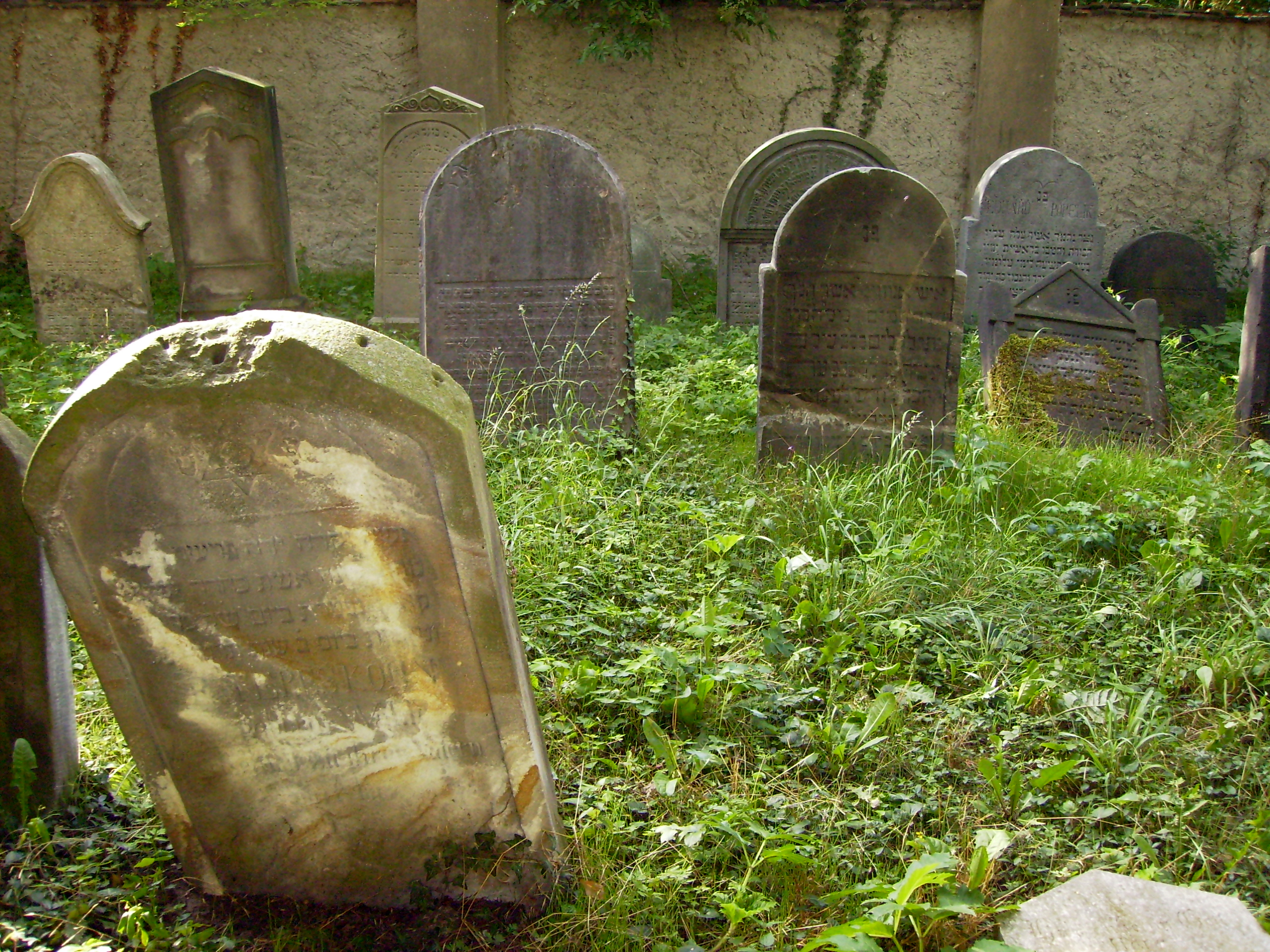 Židovský hřbitov v Kovanicích.